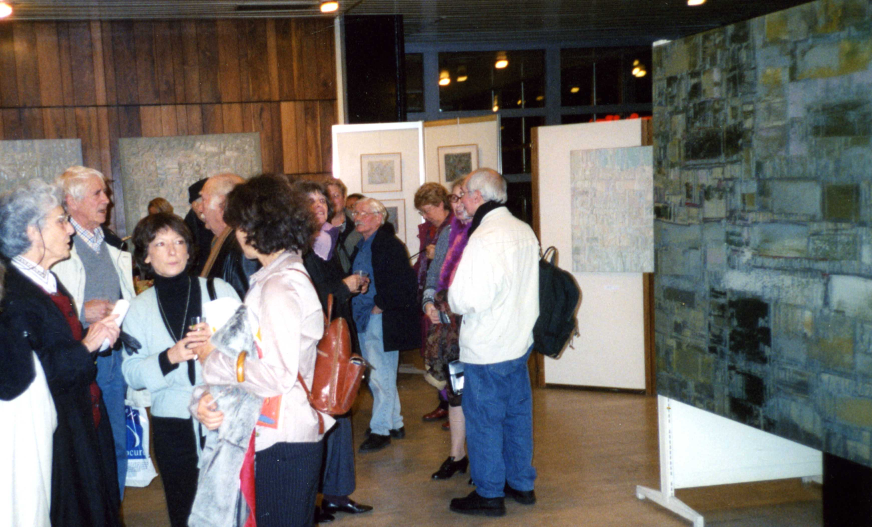 Exposition du peintre Algérien Mohamed Aksouh à la Maison des sciences de l'homme, Paris, en 2003